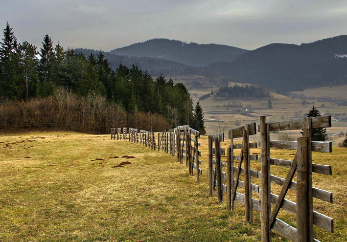 Защита пастбищ от снега